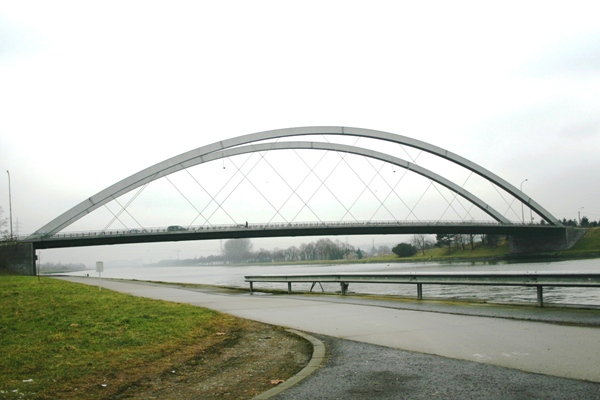 Bréck vun Haccourt.